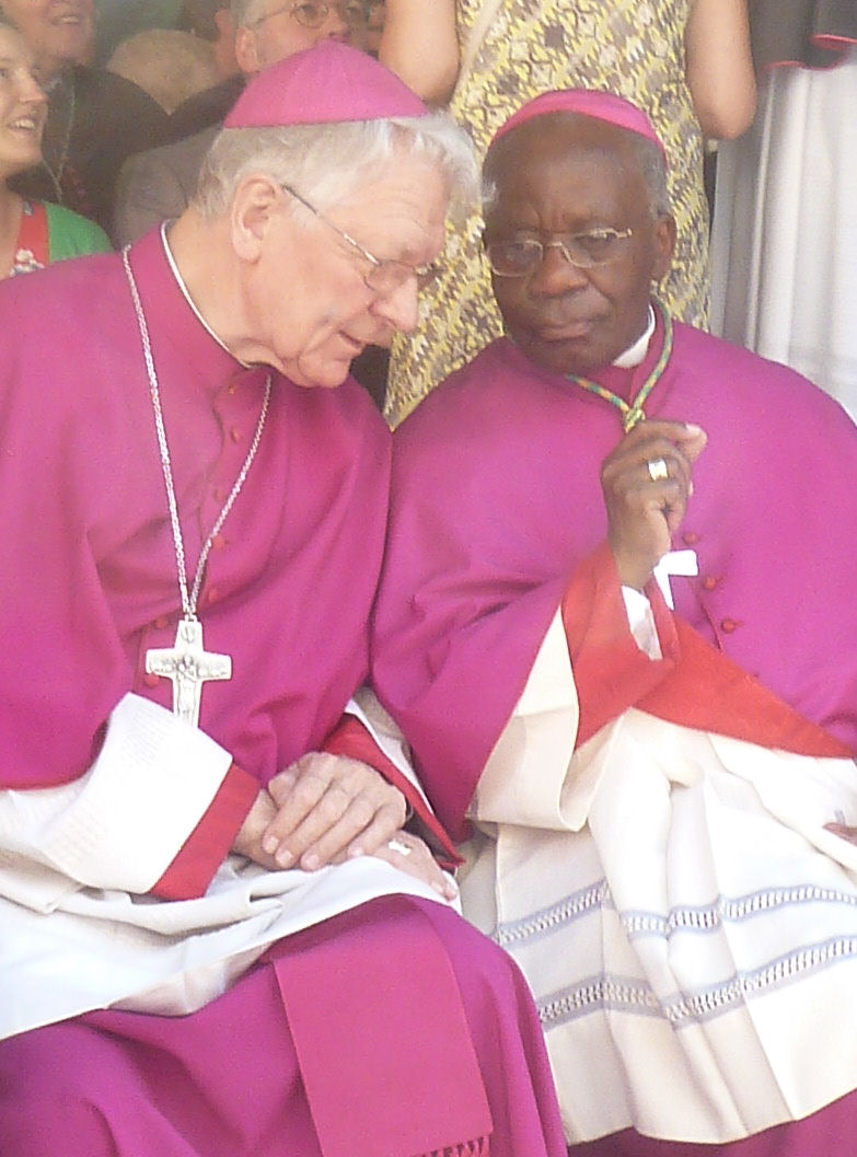 Mgrs Luc van Looy et Augustine Kasujja à la procession du précieux sang de Bruges en 2017.